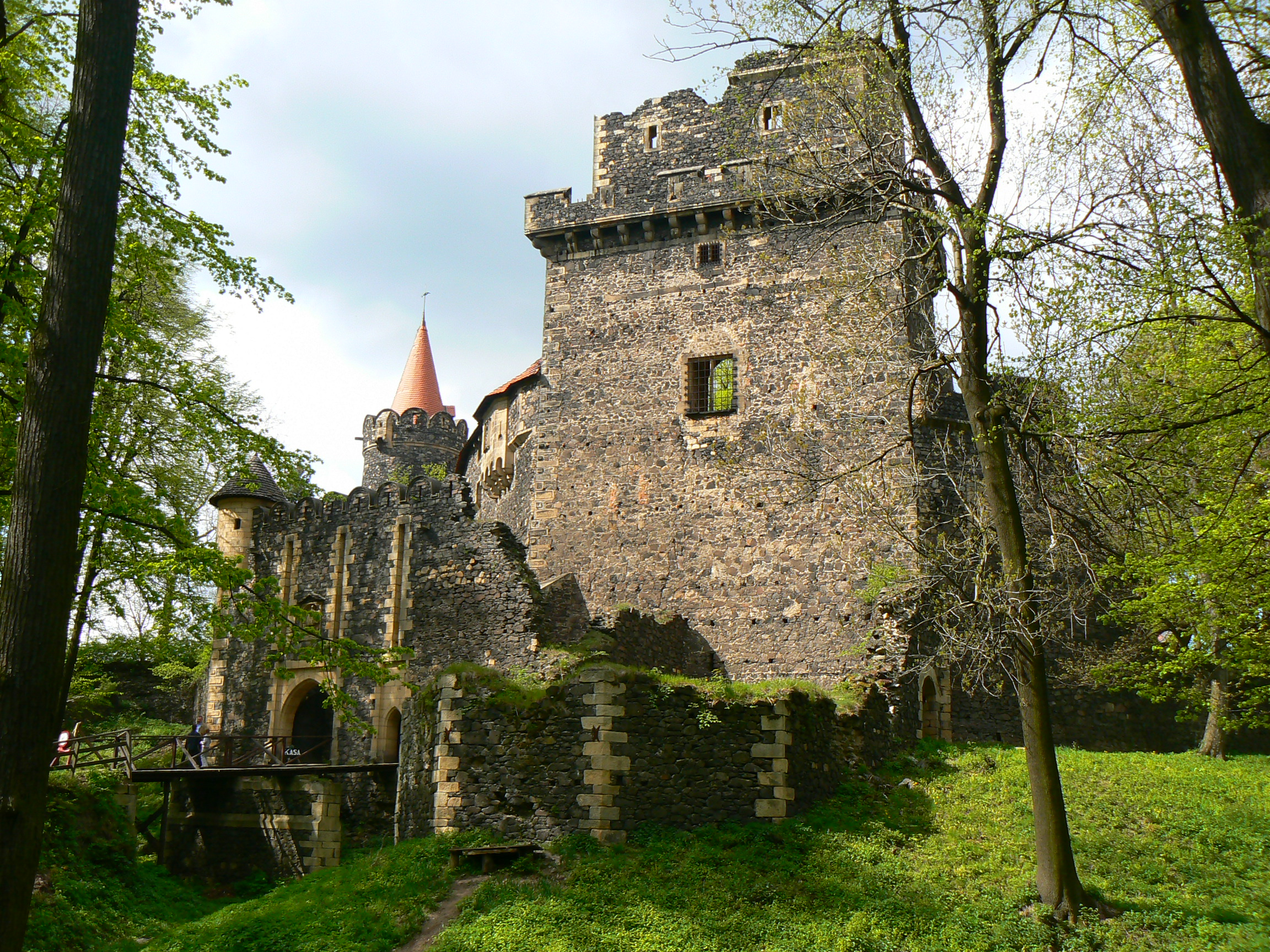 Zamek Grodziec – brama i wiaża bramna.